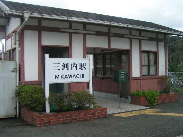 三河内駅 投稿者が撮影(2006/08/28)